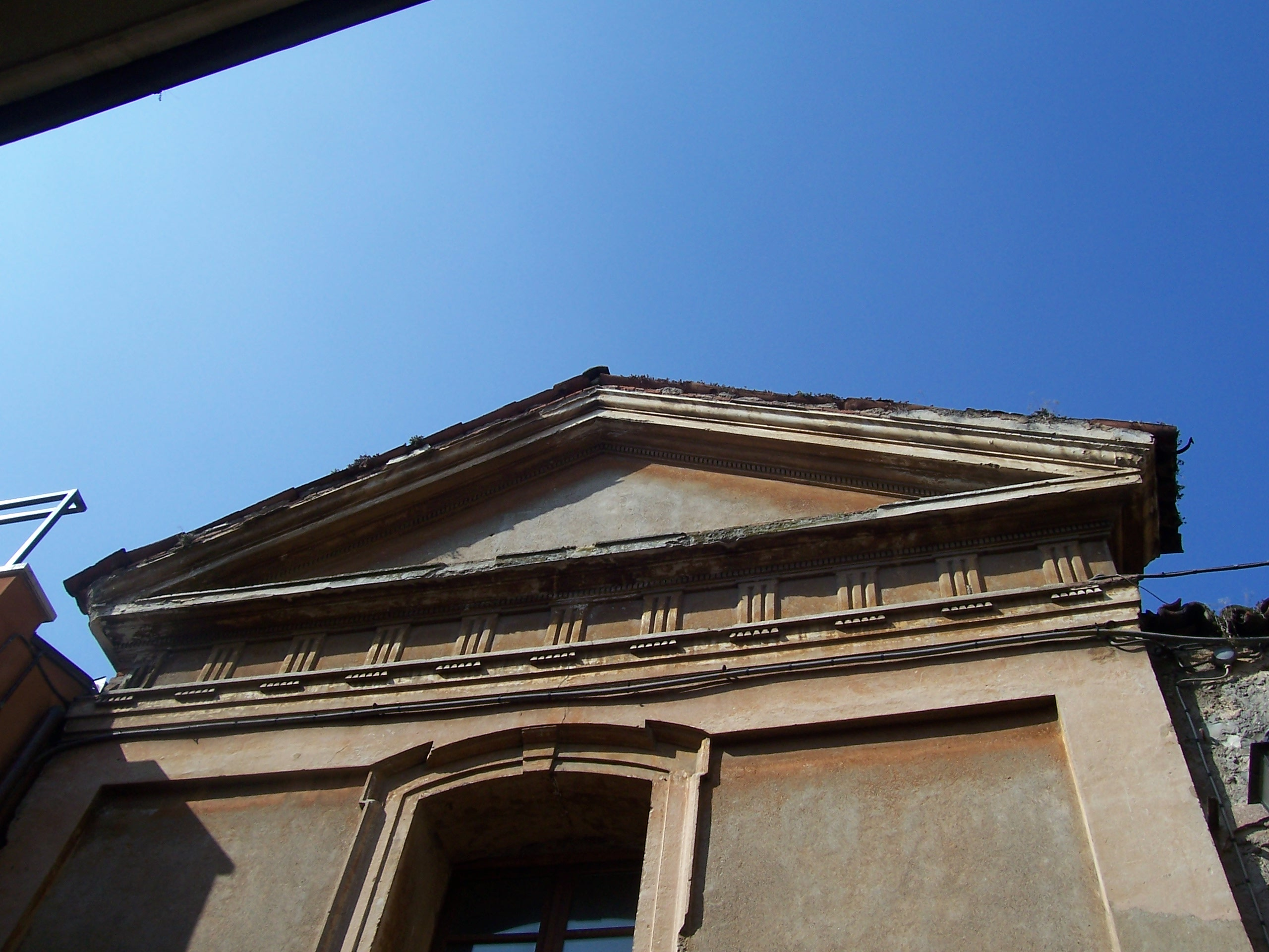 san desiderio brescia fronte.jpg